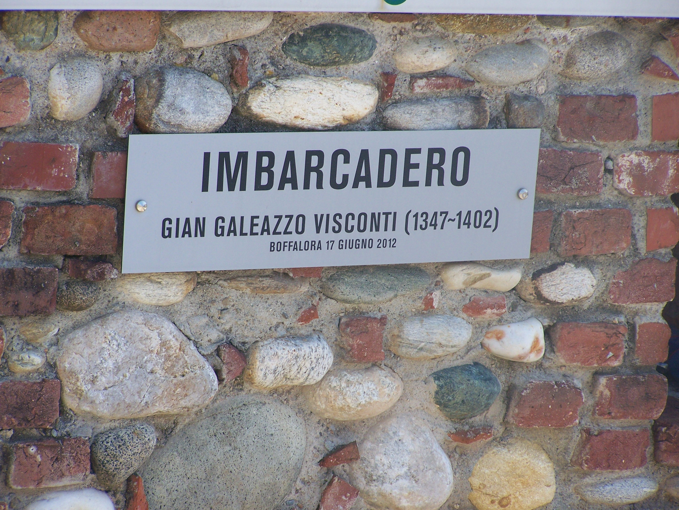 Targa dedicatoria al porto di Boffalora sopra Ticino (MI) - Italy